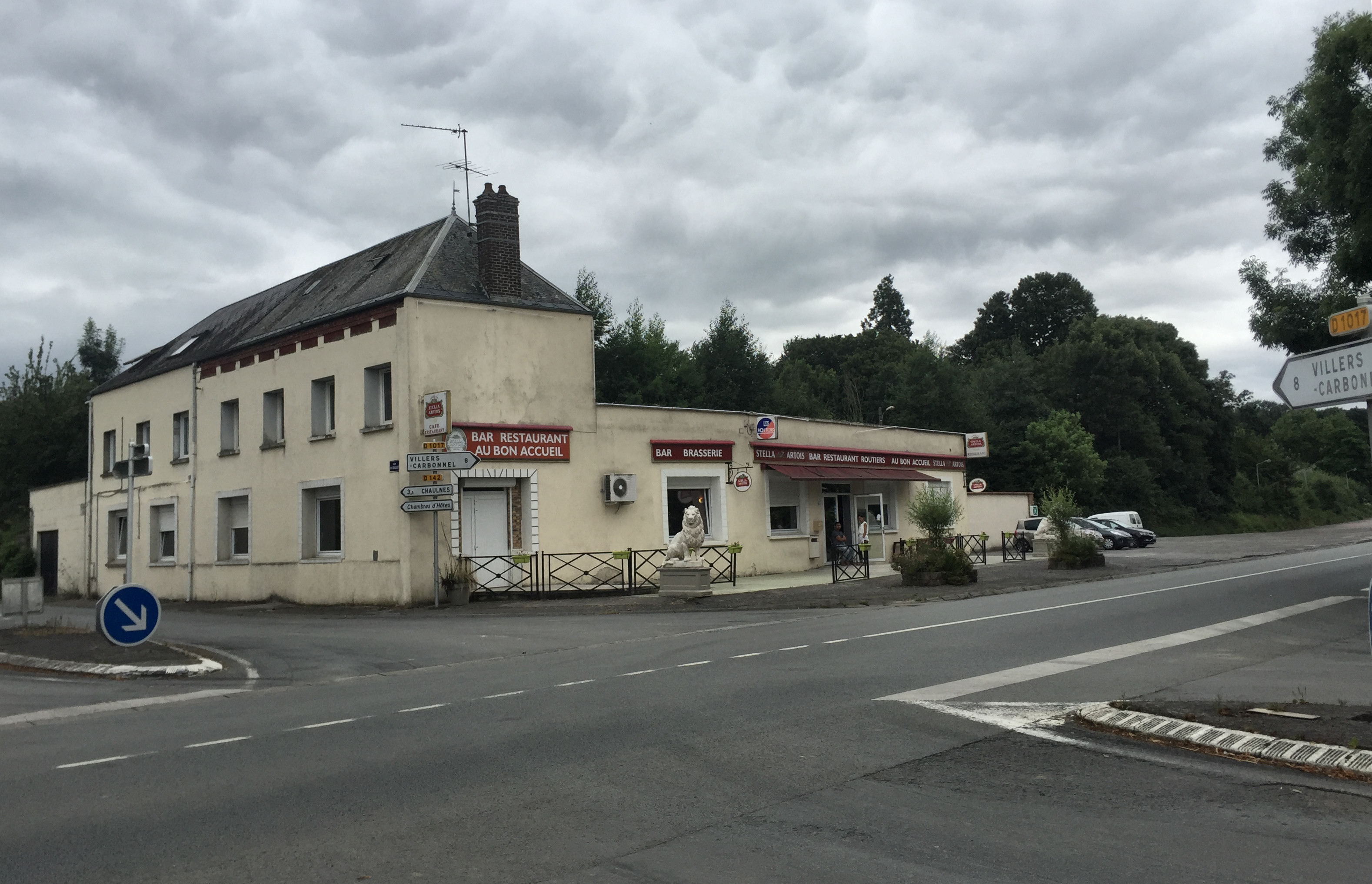 Een restaurant aan de voormalige Route Nationale 17 in Frankrijk